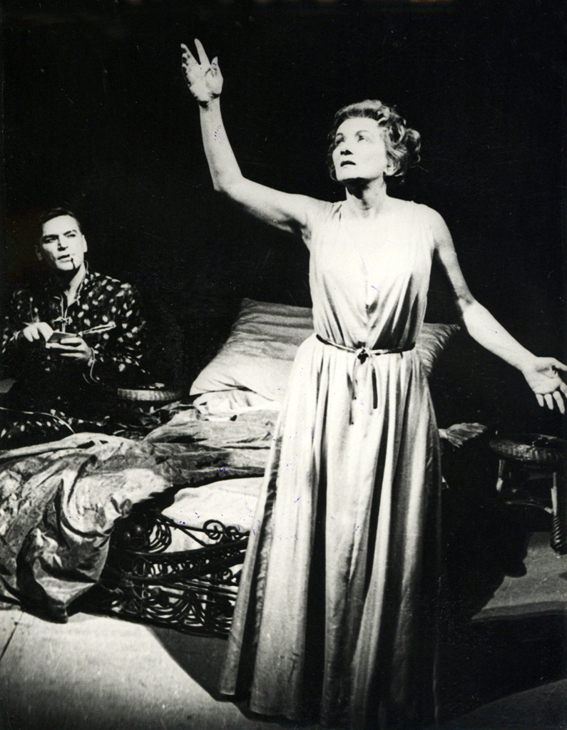 Tennessee Williams, Mila ptica mladosti, Drama SNG v Ljubljani. Na fotografiji: Bert Sotlar (Chance Wayne), Sava Sever (Princesa Kosmonopolis).